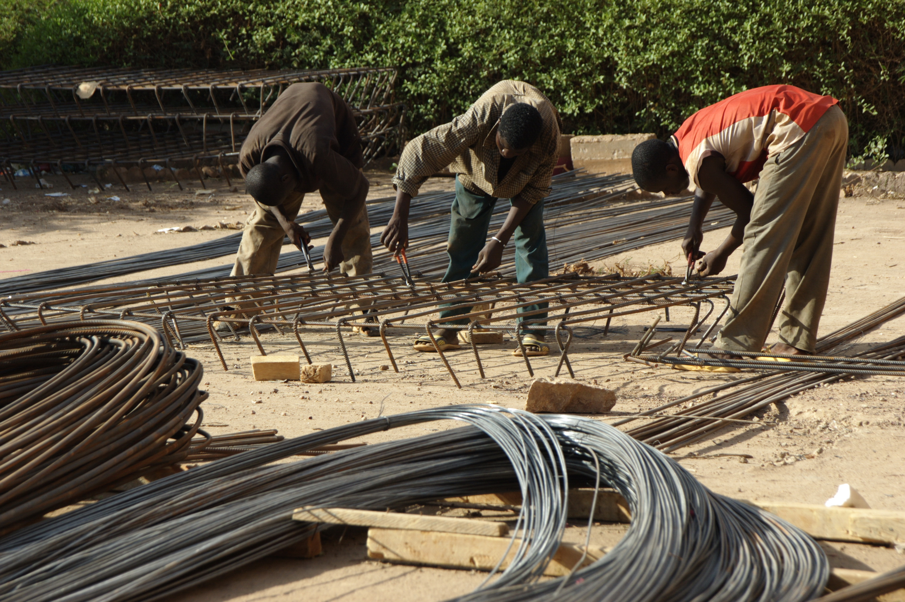 Armatures de béton en construction lors de la construction des nouveaux bâtiments de l'aéroport international de Ouagadougou